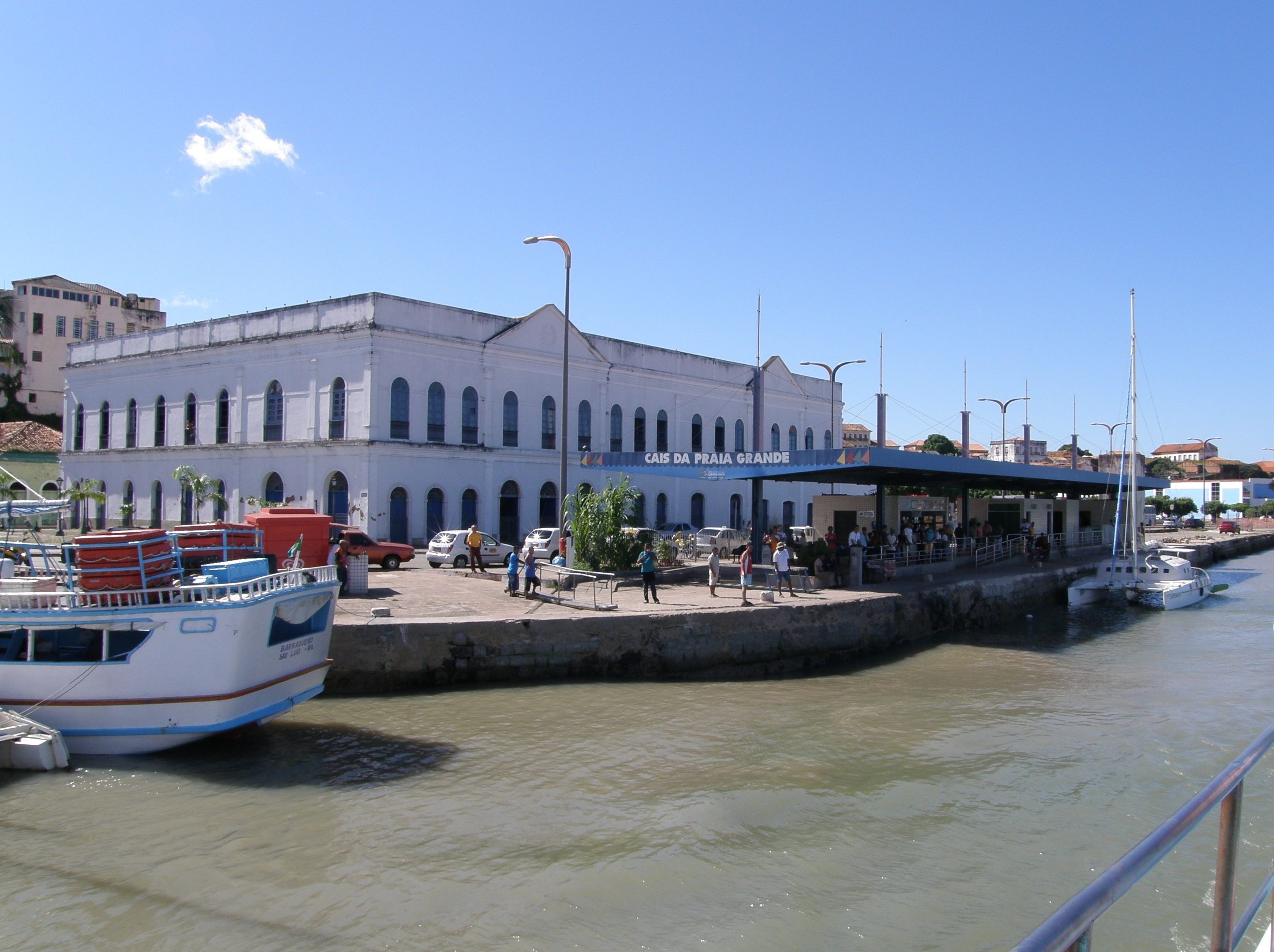 São Luís, MA: conjunto arquitetônico e paisagístico